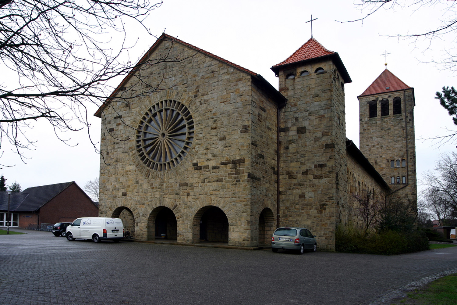 St. Ludgerus